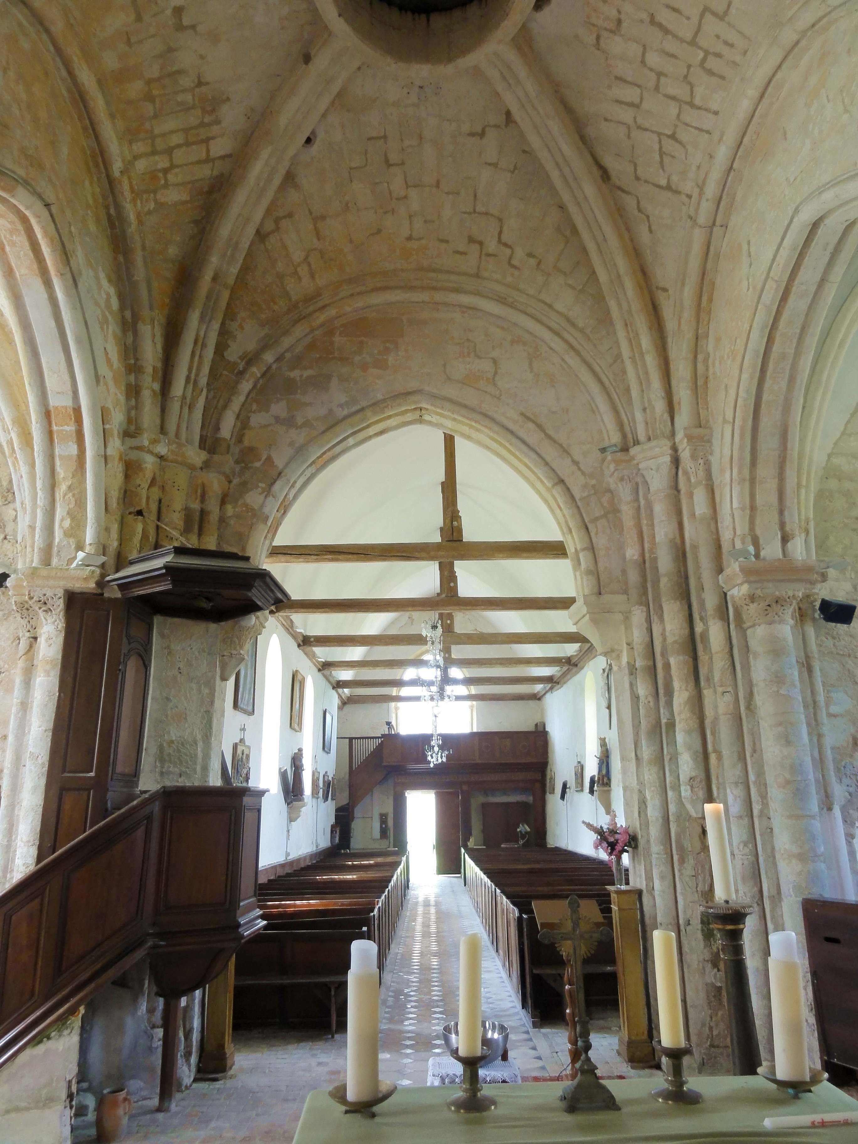 Intérieur de l'église - voir titre.